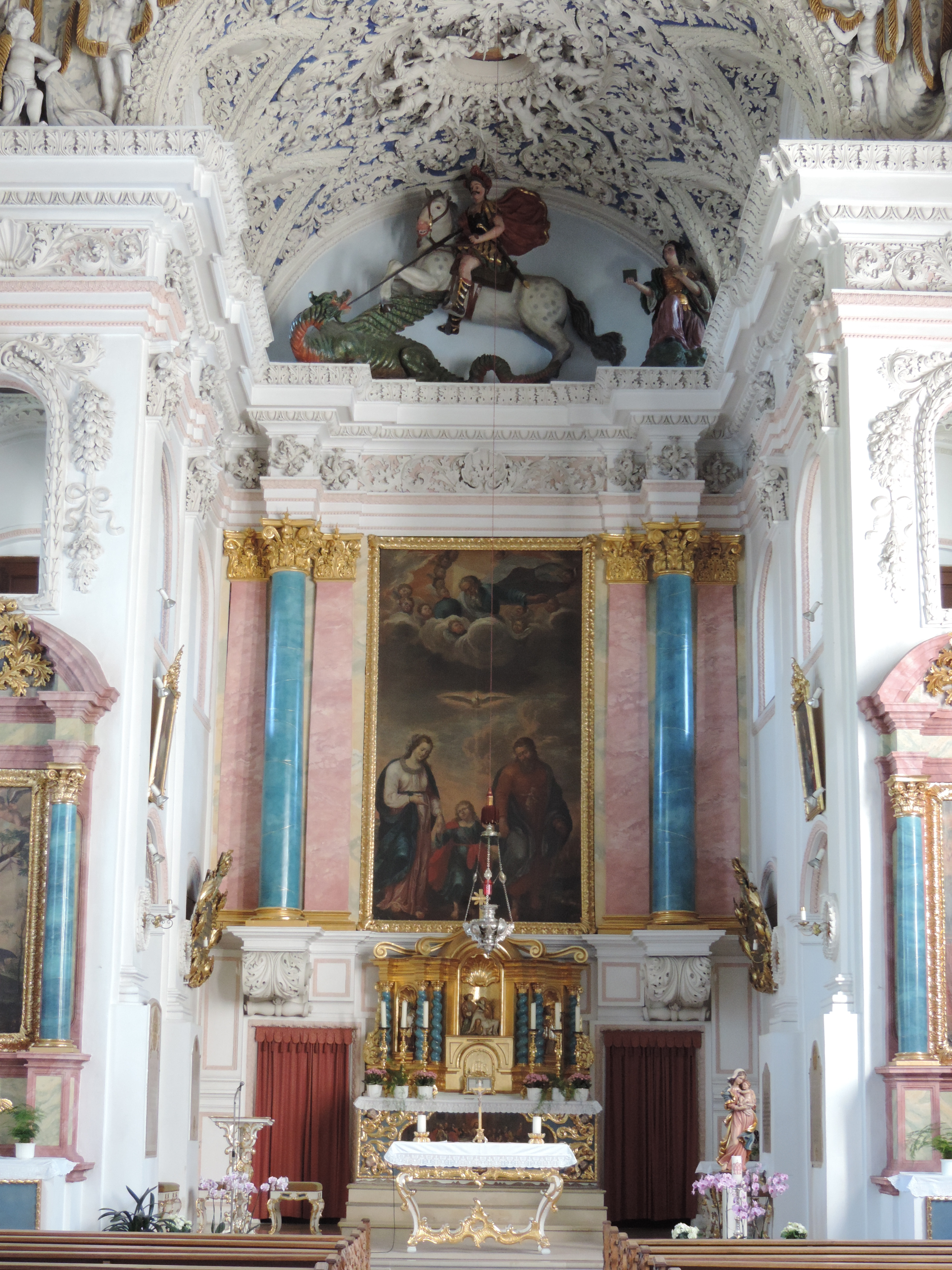 Altarraum